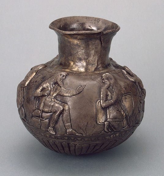 Чаша, найденная под Воронежем, в «Частых Курганах». Сейчас хранится в Эрмитаже. На рисунке царь Таргитай, прародитель скифов, передаёт лук – знак власти – своему младшему сыну Колаксаю.